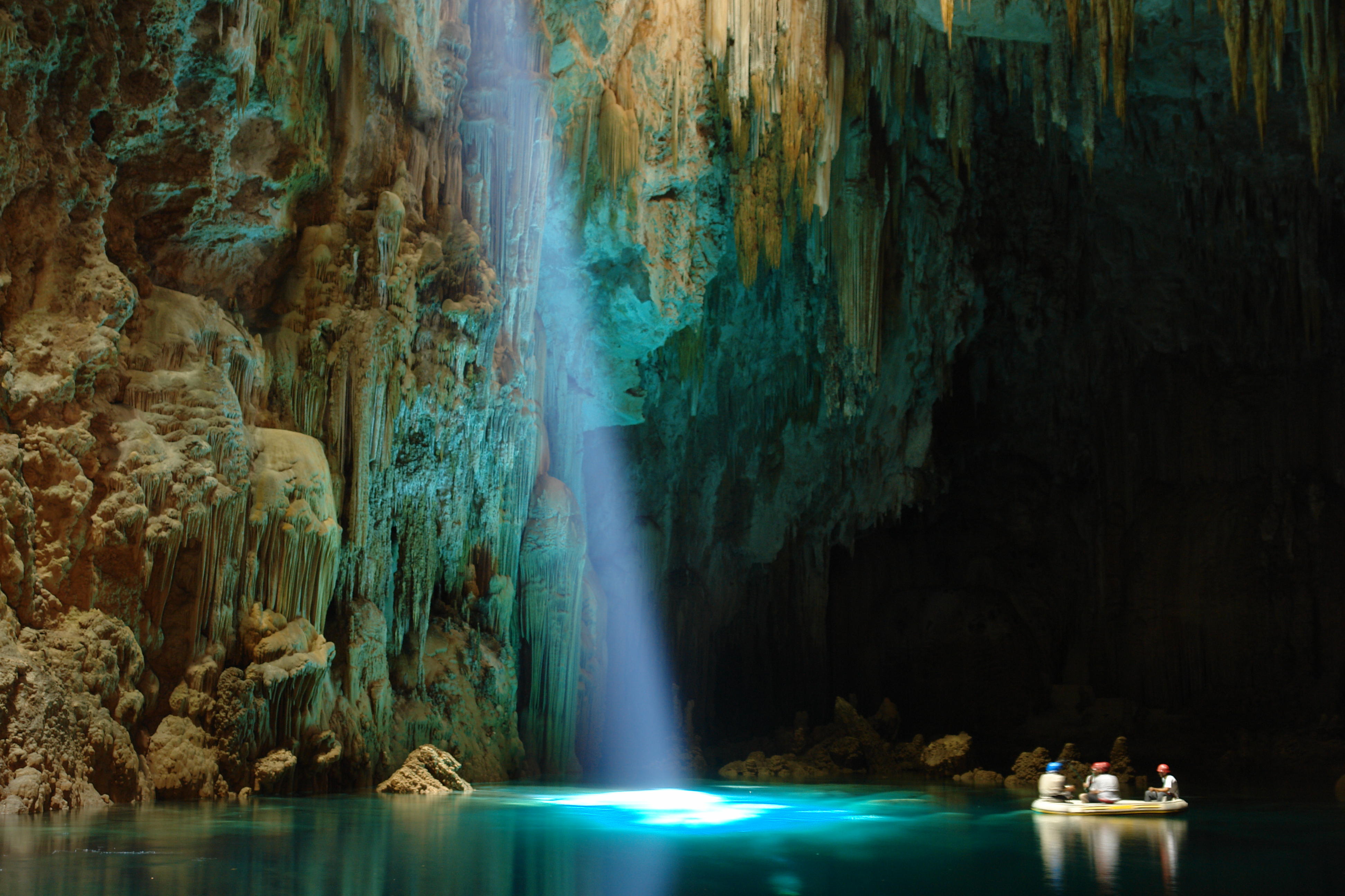 Interior do abismo Anhumas iluminado por raios solares através de claraboia natural.